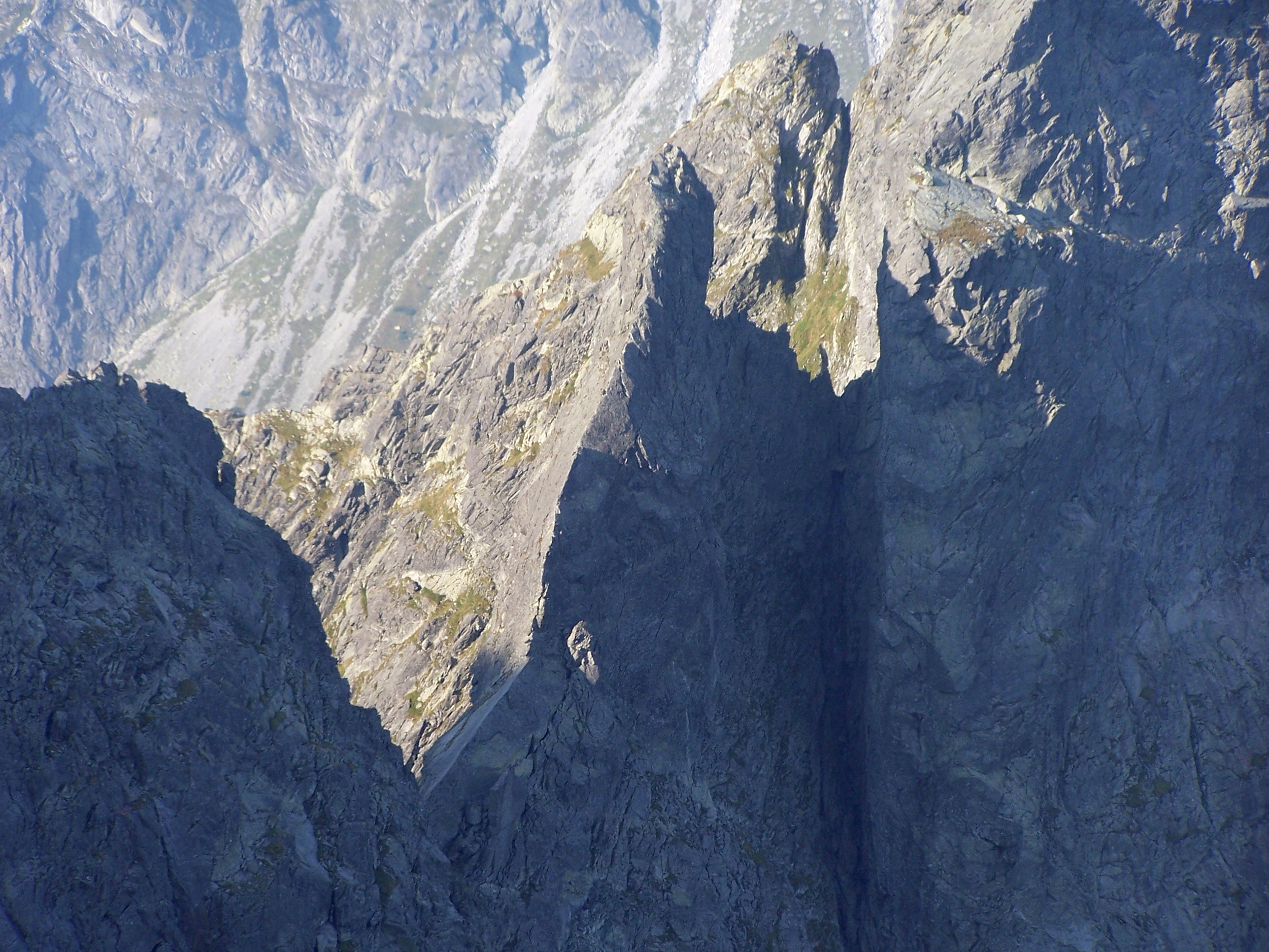 Żabi Koń